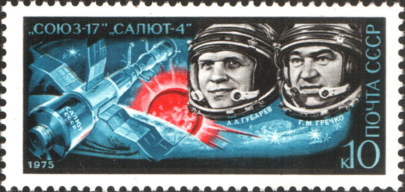 Почтовая марка СССР 1975 года. Космические корабли «Союз-17» «Салют-4». Космонавты Губарев и Гречко. ЦФА #4446